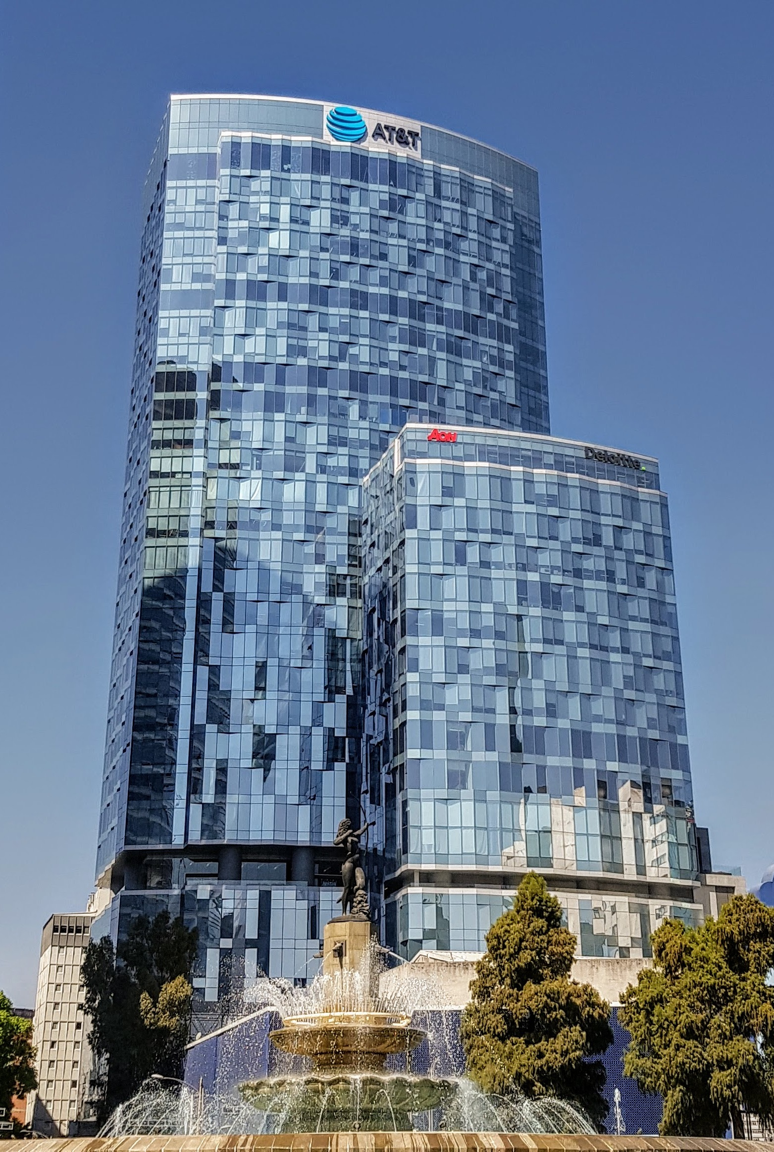 Torre Diana en la Ciudad de México